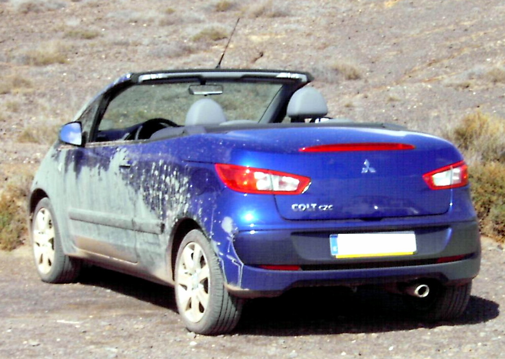 muddy car on Lanzarote